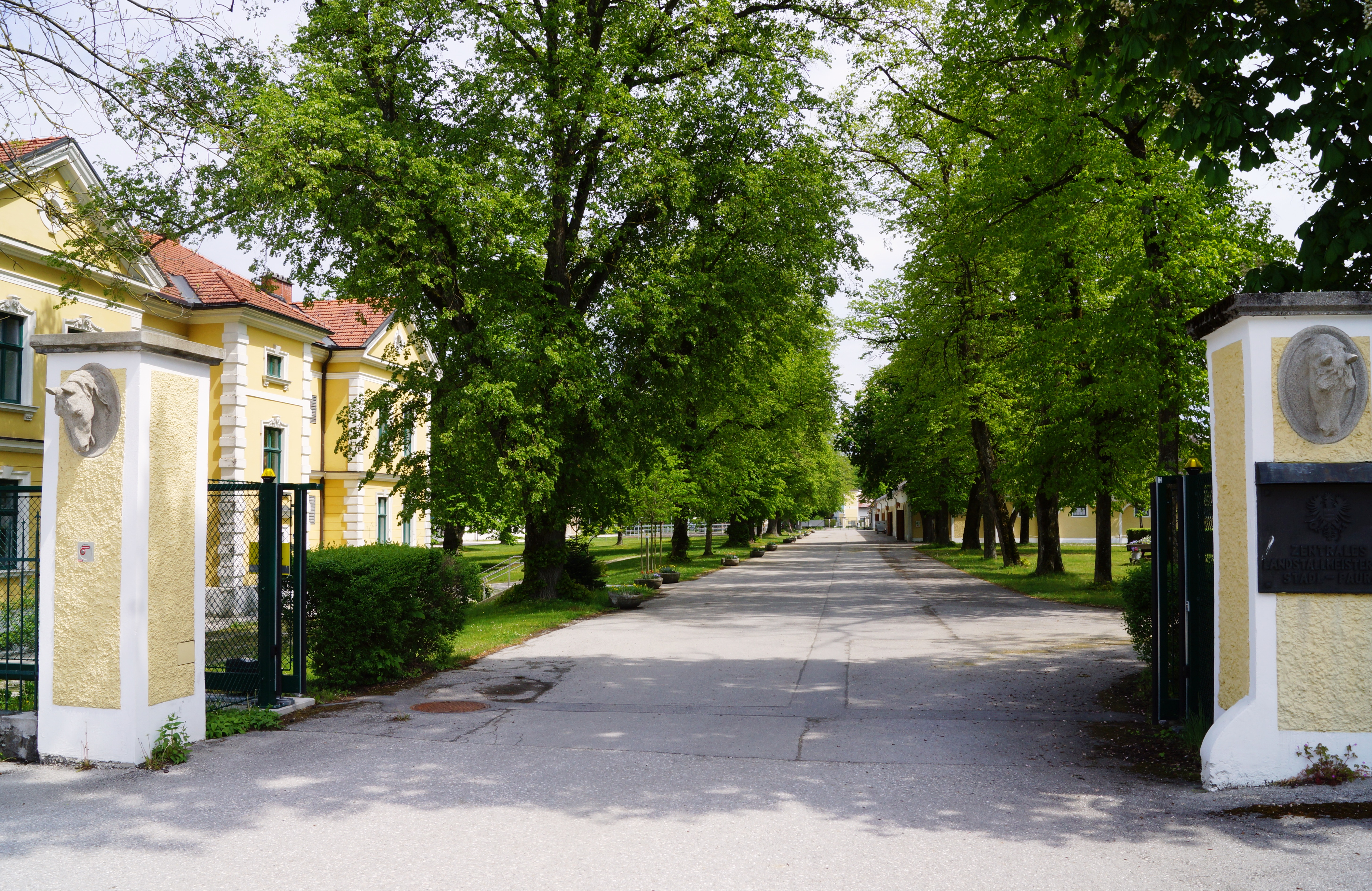 Das Pferdezentrum Stadl-Paura gilt mit seiner über 200-jährigen Geschichte als österreichisches Kulturgut.